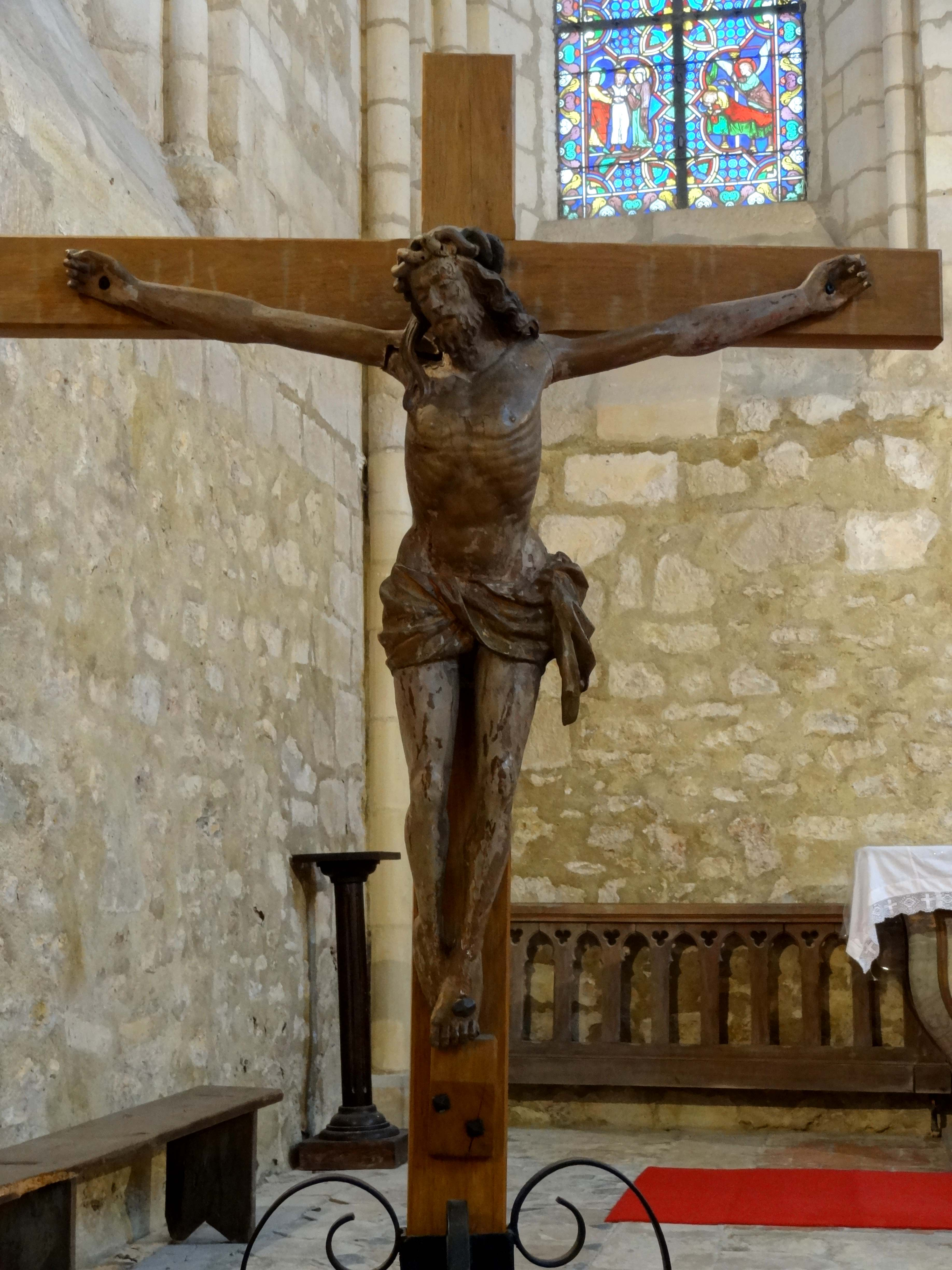 Mobilier de l'église - voir titre.